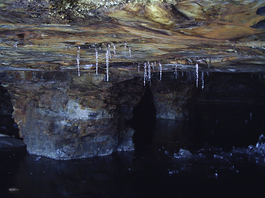 Grotta vid Västra Tunhem, i Hunneberg. Fotograf:Tubaist.